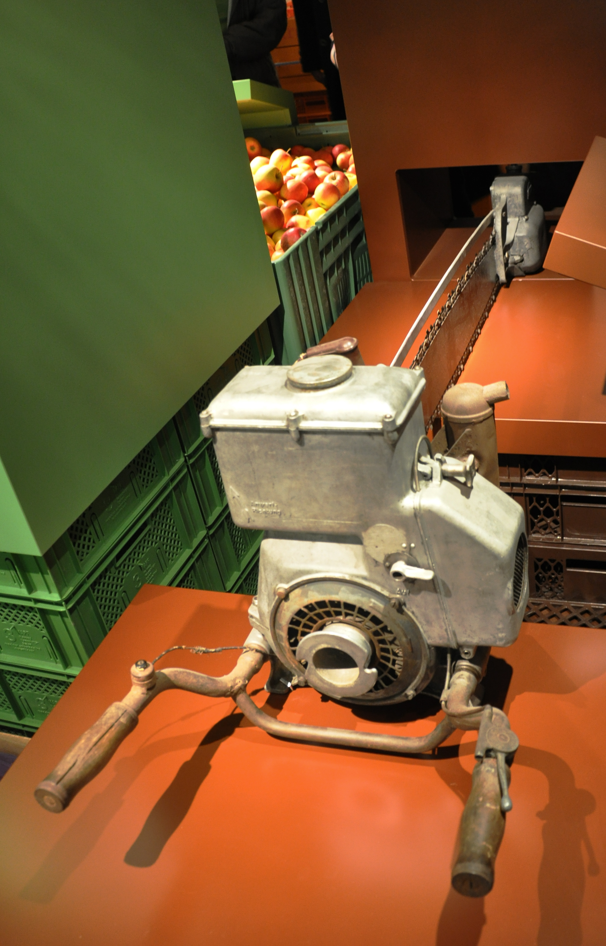 Motorsäge Stihl KS43, Baujahr 1947, ausgestellt im Wirtschaftsmuseum Ravensburg, Wirtschaftsmuseum LocationRavensburg, GermanyCoordinates47° 46′ 49.43″ N, 9° 36′ 55.42″ E Established28 October 2012Web page control : Q2585923 institution QS:P195,Q2585923